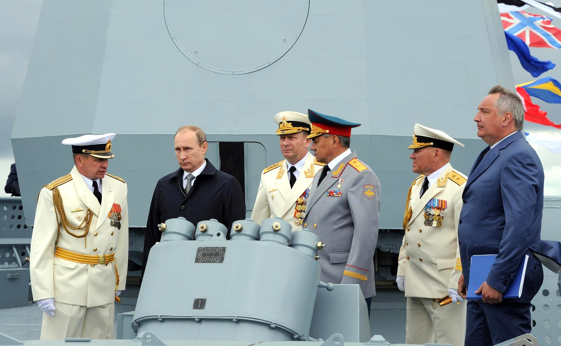 Президент России Владимир Путин на Дне Военно-Морского Флота России в Балтийске. На борту фрегата ”Адмирал флота Советского Союза Горшков“